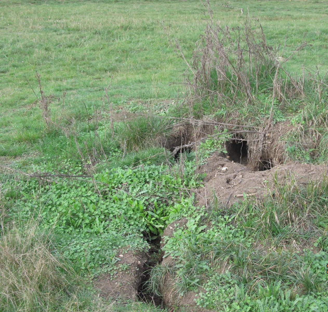 Nory zde žijících králíků